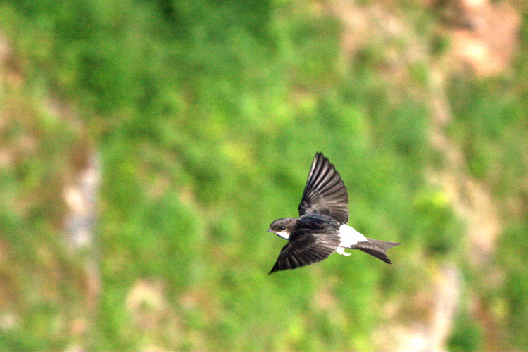 Hirondelle de fenêtre en vol (France - Loire (42))